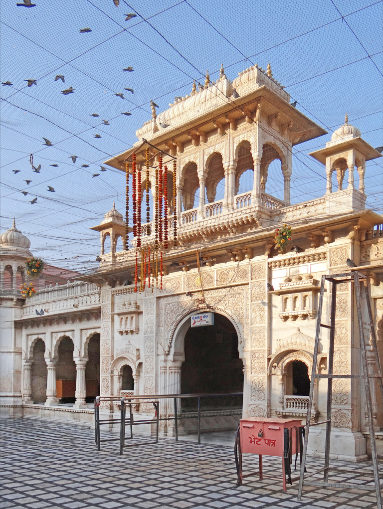 La cour du temple La mystique Karni Mata est considérée par les dévots comme une incarnation de Durga. Elle vécut au XVème siècle. Le temple qui lui est consacré est situé à Deshnoke (village à 33 km de Bikaner). Il est peuplé de rats sacrés qui sont en liberté et circulent entre les jambes des visiteurs. Les bâtiments du temple datent du XVIIème siècle (époque de Ganga Singh). La façade est en marbre blanc finement sculpté. Les rats seraient la réincarnation des membres de la caste des Charan, à laquelle appartenait Karni Mata.